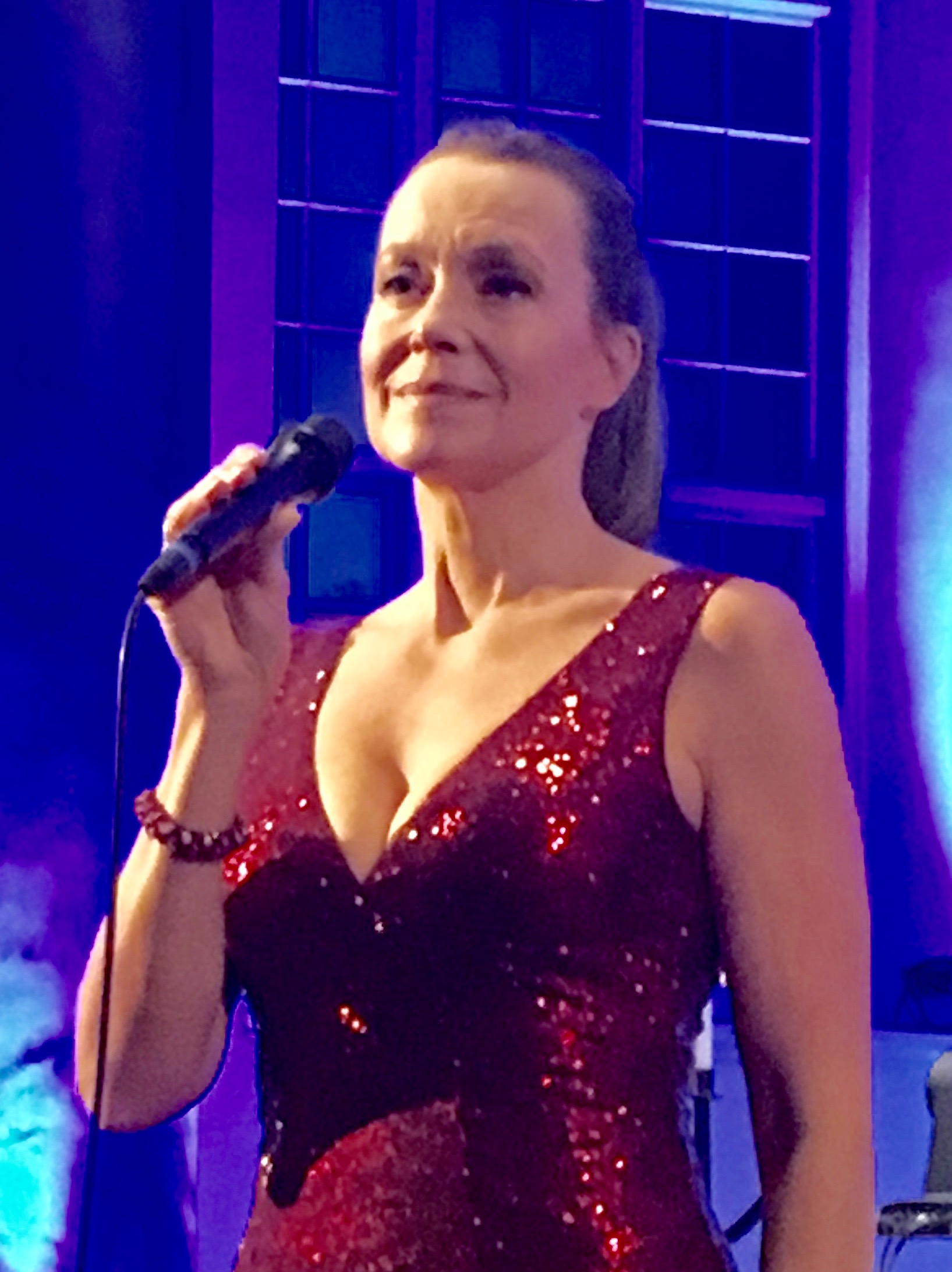 Den svenska sopranen Jeanette Köhn